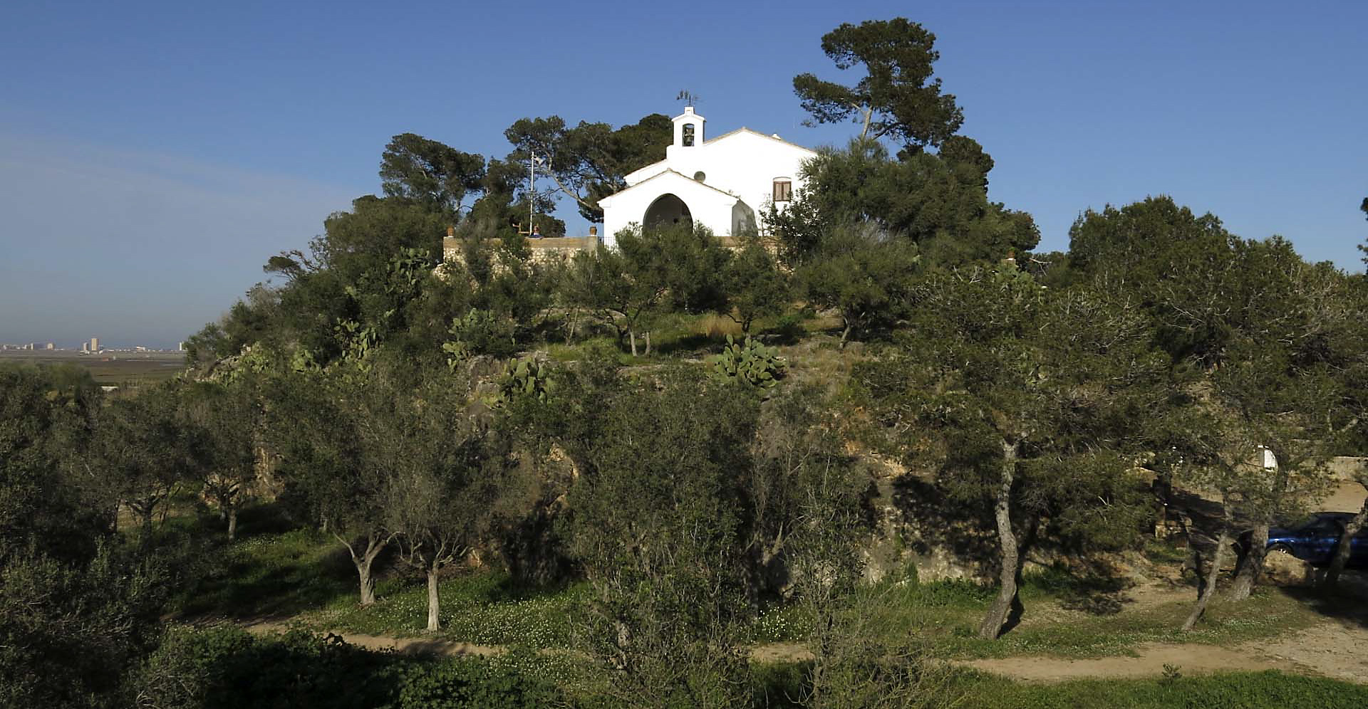 La Muntanyeta dels Sants (Sueca), s'hi troba al Parc Natural de l'Albufera de València. Dalt de la imatge es pot veure l'Ermita dels Sants de la Pedra.